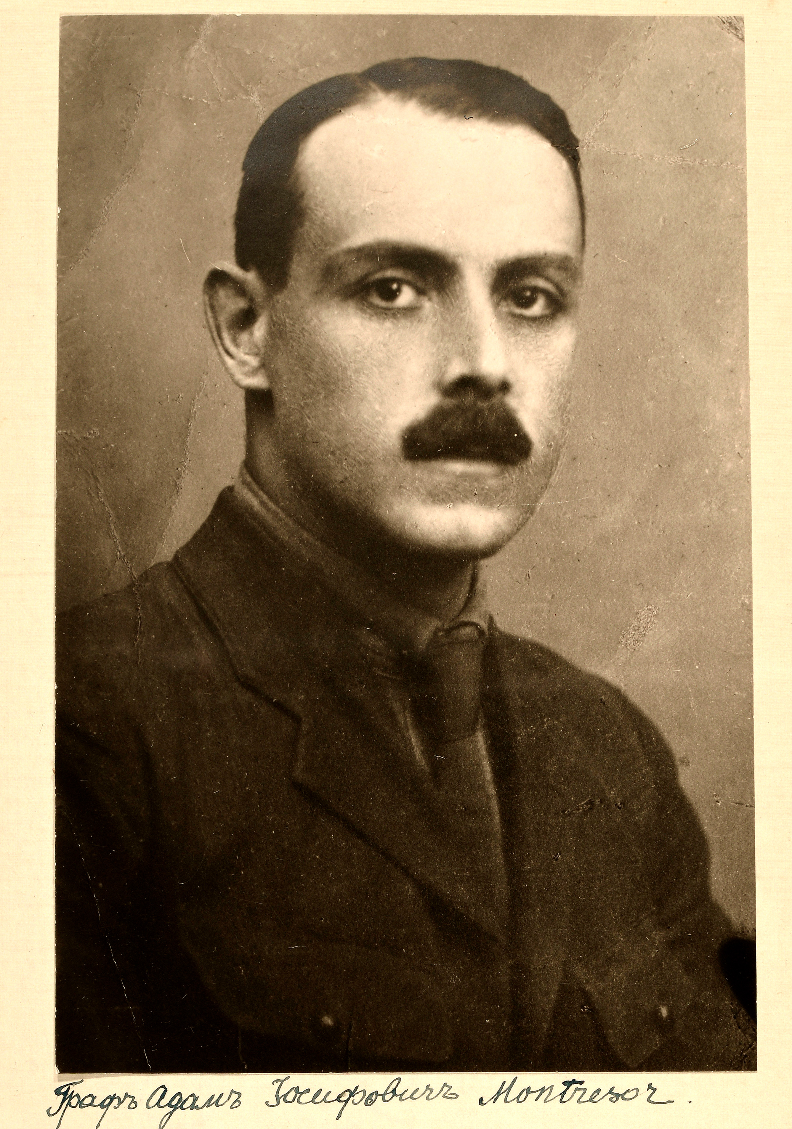 Фото з паспорту Адама Монтрезора